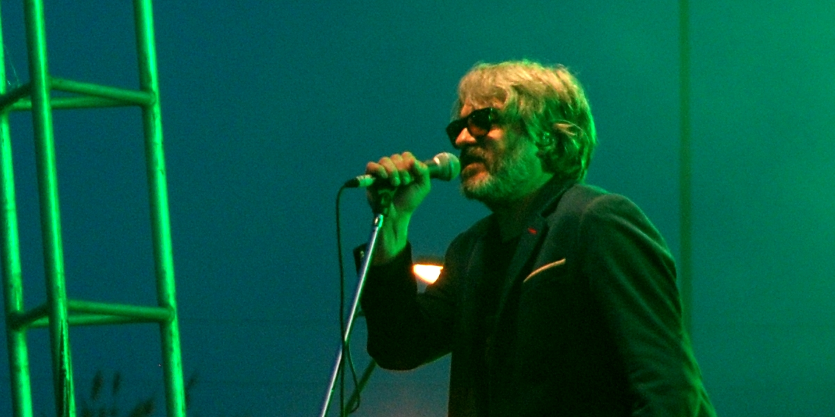 Estelares en 19 y 72, La Plata.